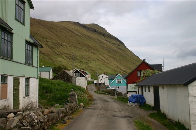 Village Husar,Faroe Island